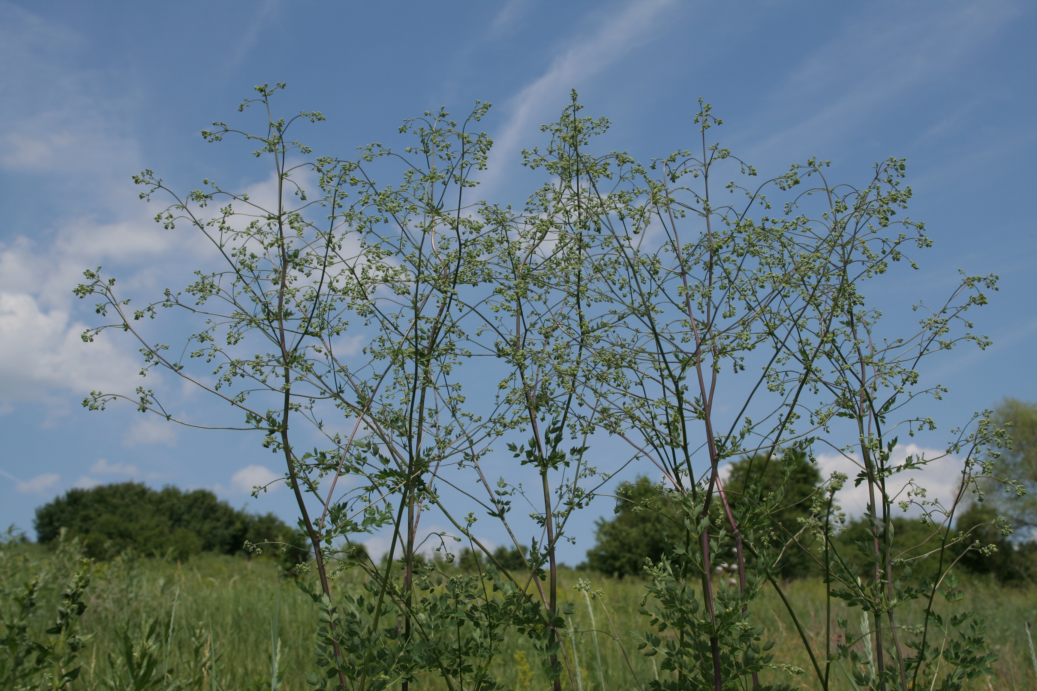 Василистник малый. Балка Пестрая Белгородская область.